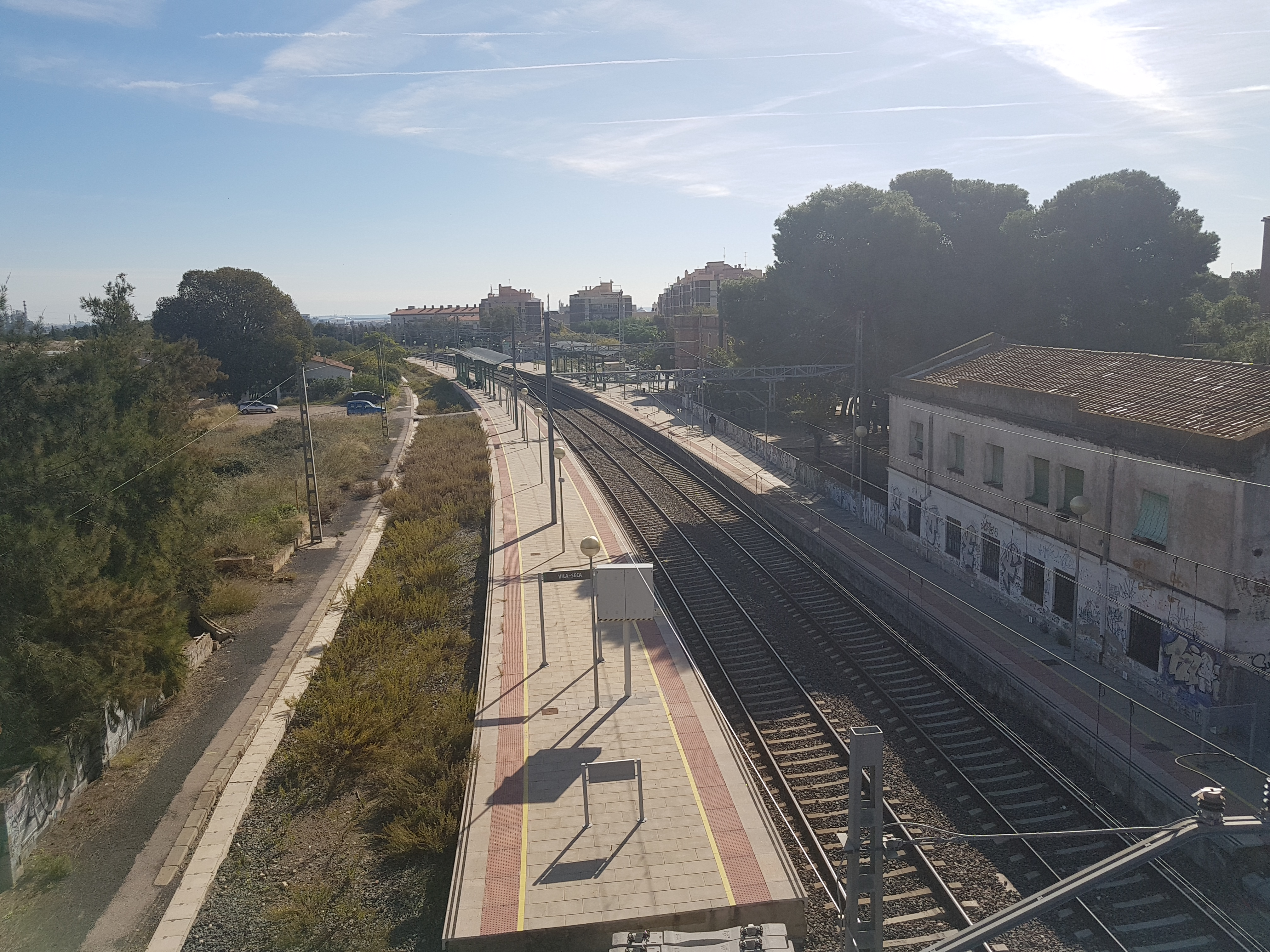 Vista elevada de la estació de Vila-seca (Tarragonès) a la línia Tarragona-Reus-Lleida